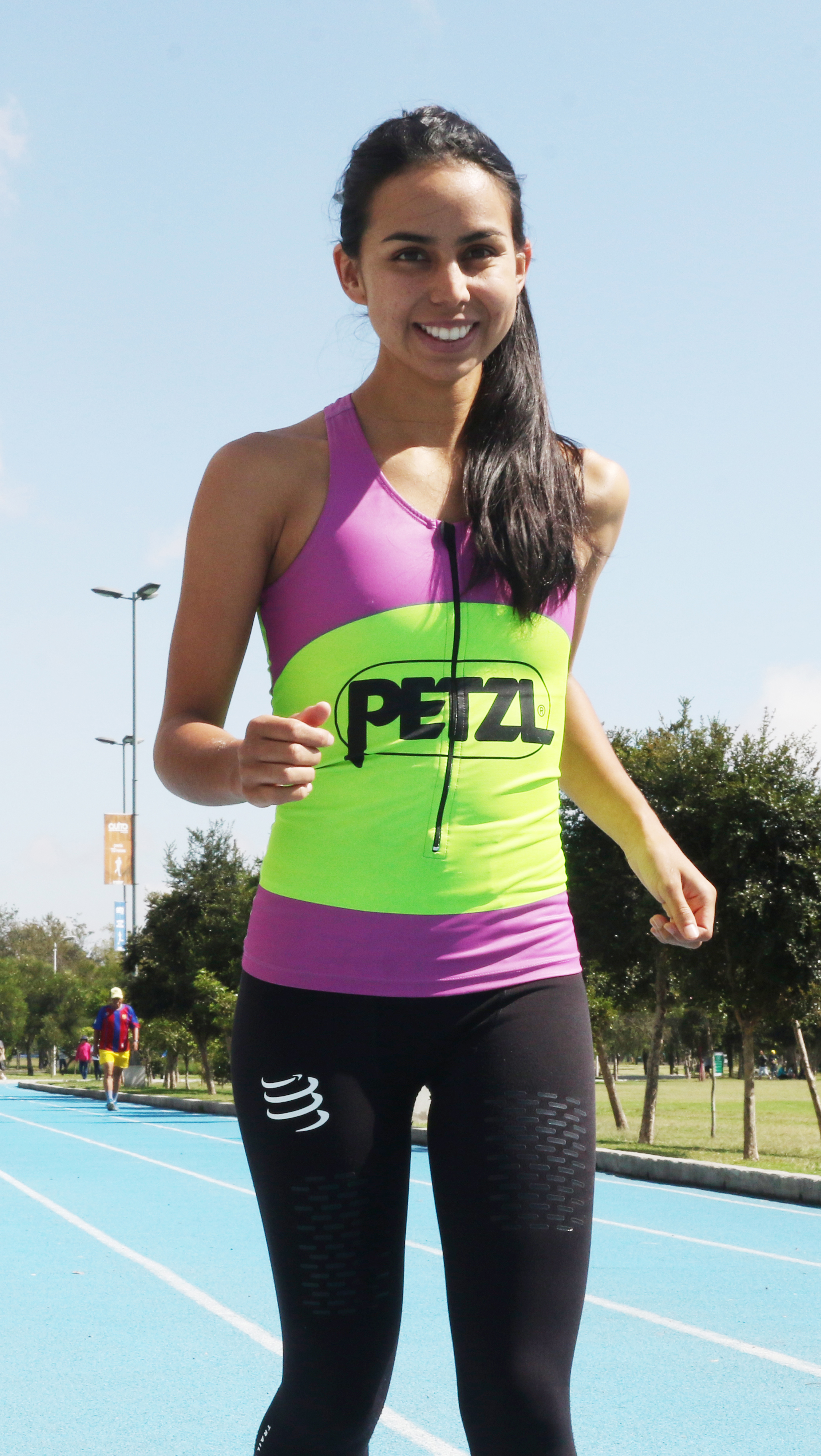 La montañista Daniela Sandoval en 2018.